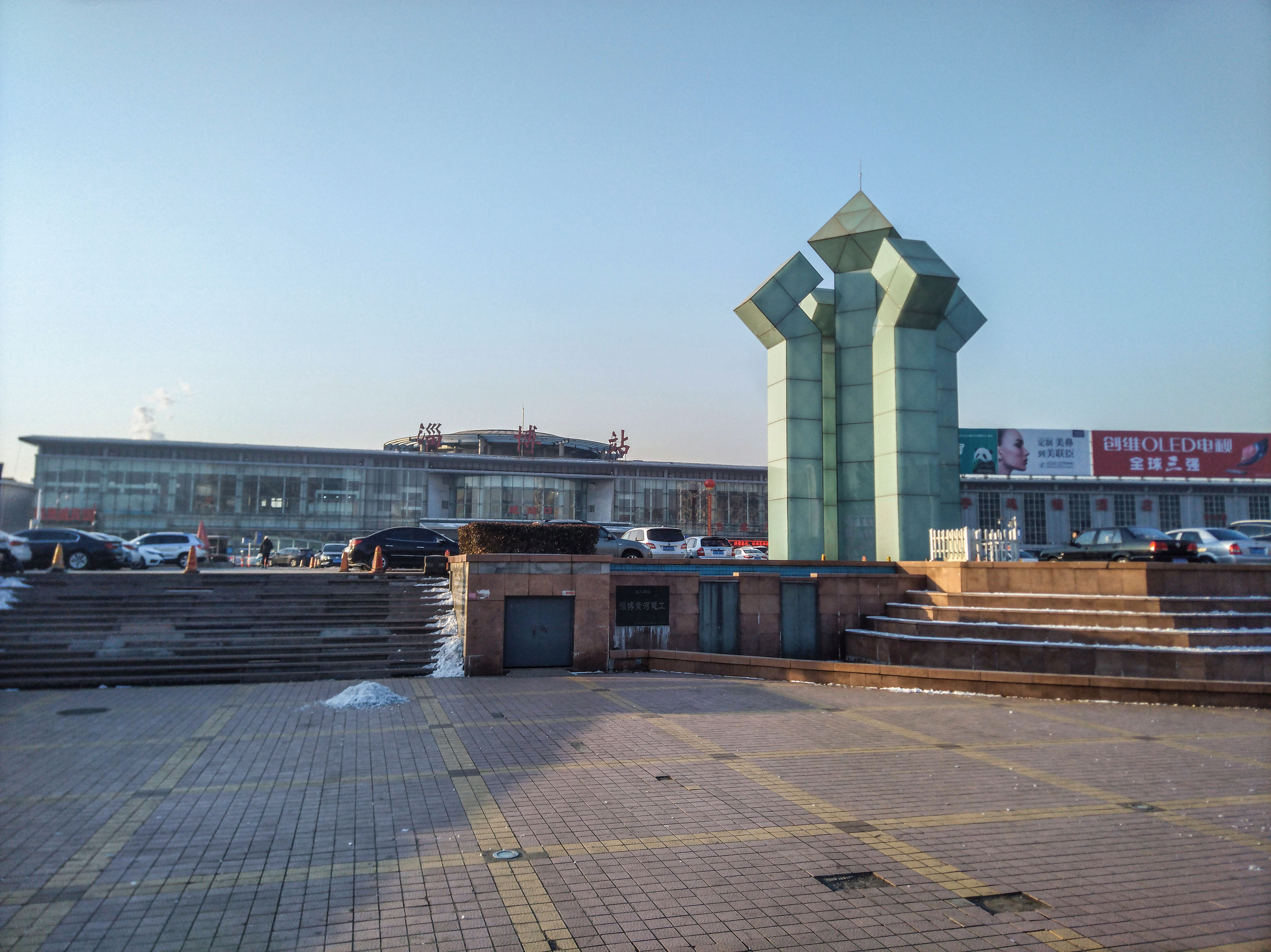 淄博火车站站房和站前广场